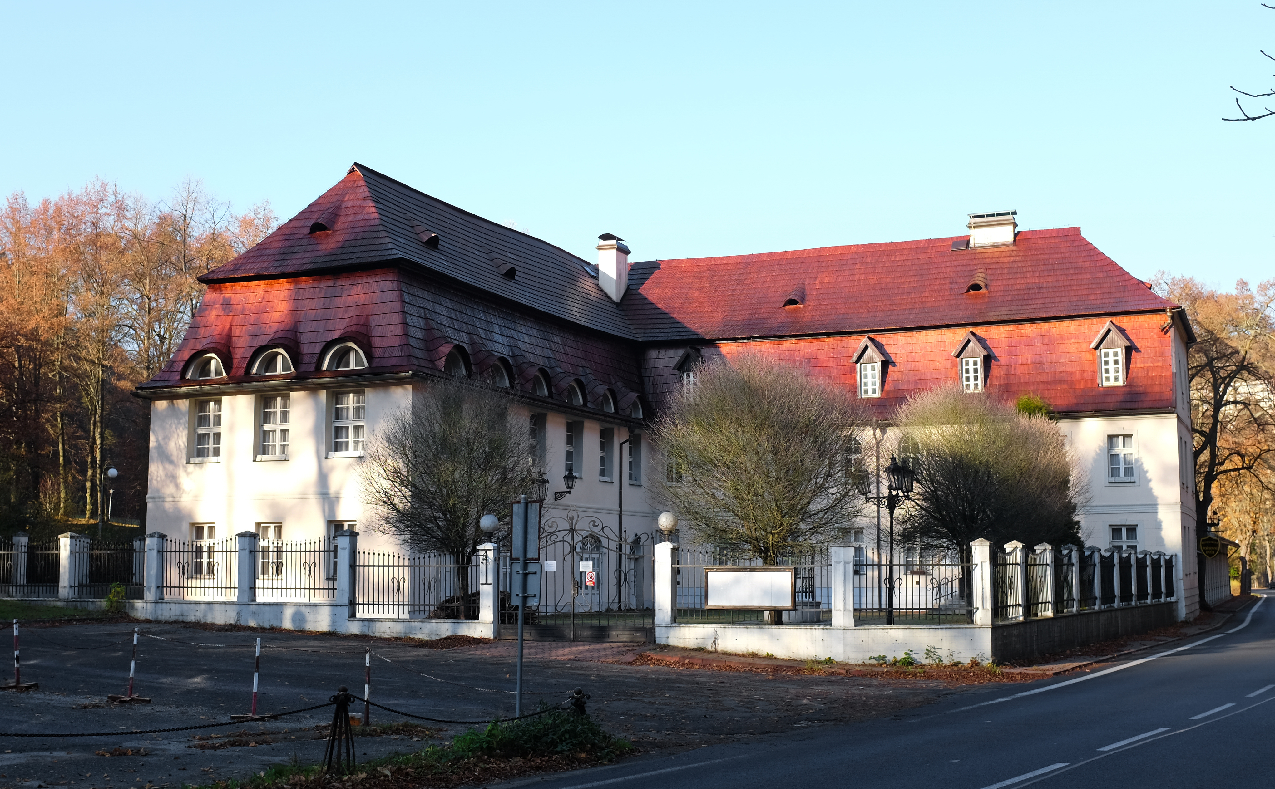 Poštovní dvůr, Slovenská 309/2, Karlovy Vary.